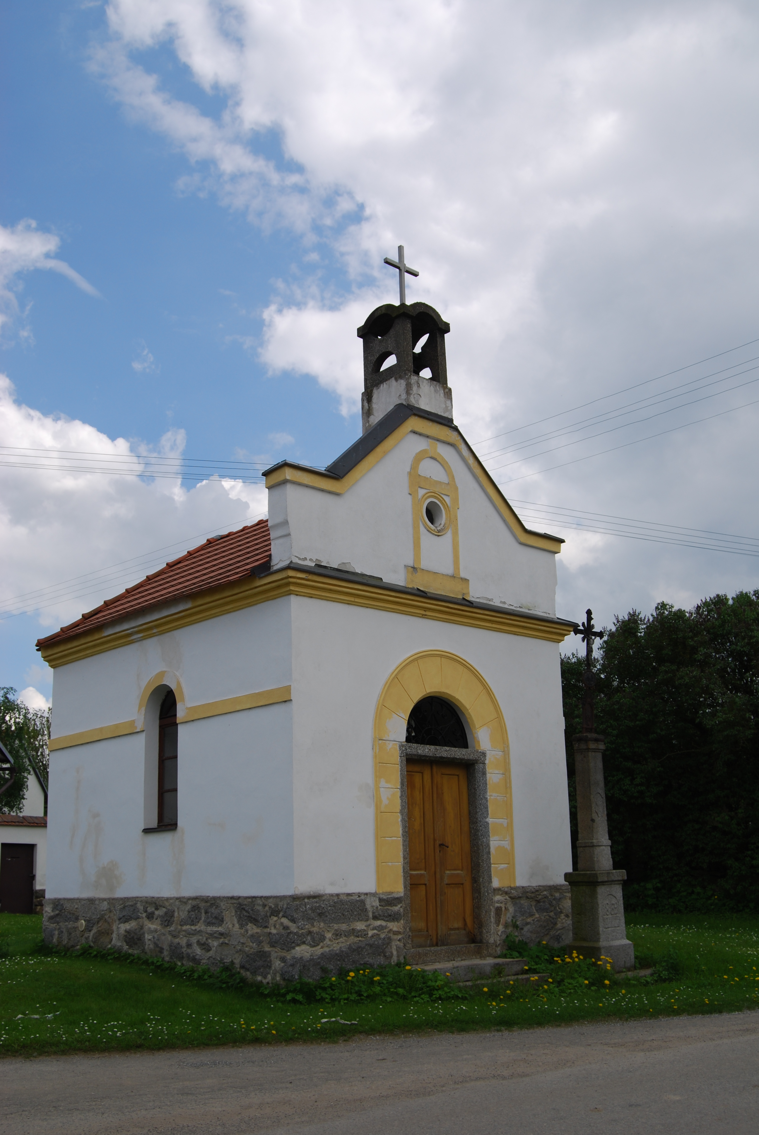 Návesní kaple s křížem. Šanovice je část města Sedlec-Prčice v okrese Příbram. Česká republika.